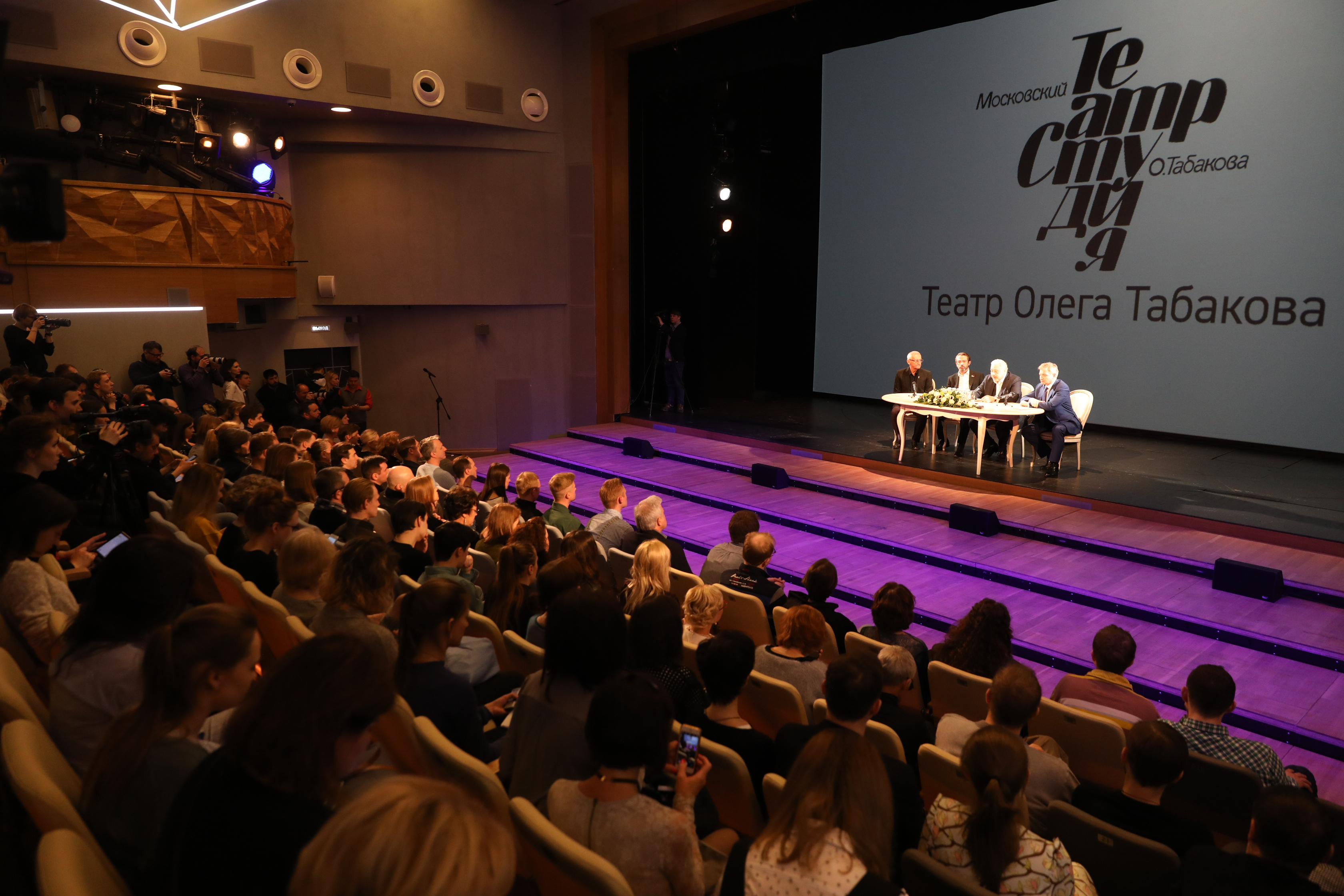 Заместитель Мэра Москвы Леонид Печатников и министр Правительства Москвы, руководитель Департамента культуры города Москвы Александр Кибовский представляют труппе Московского театра-студии «Табакерка» нового художественного руководителя – народного артиста России Владимира Машкова